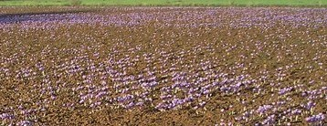 logotipo albumes fotos azafrán